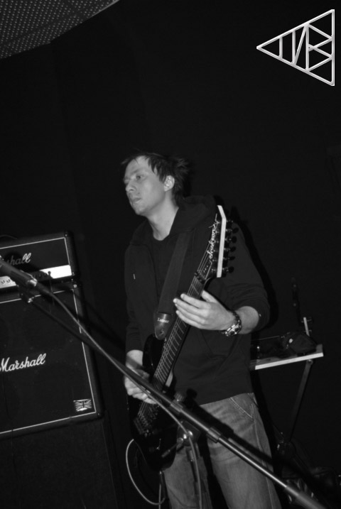 репетиция Стиз